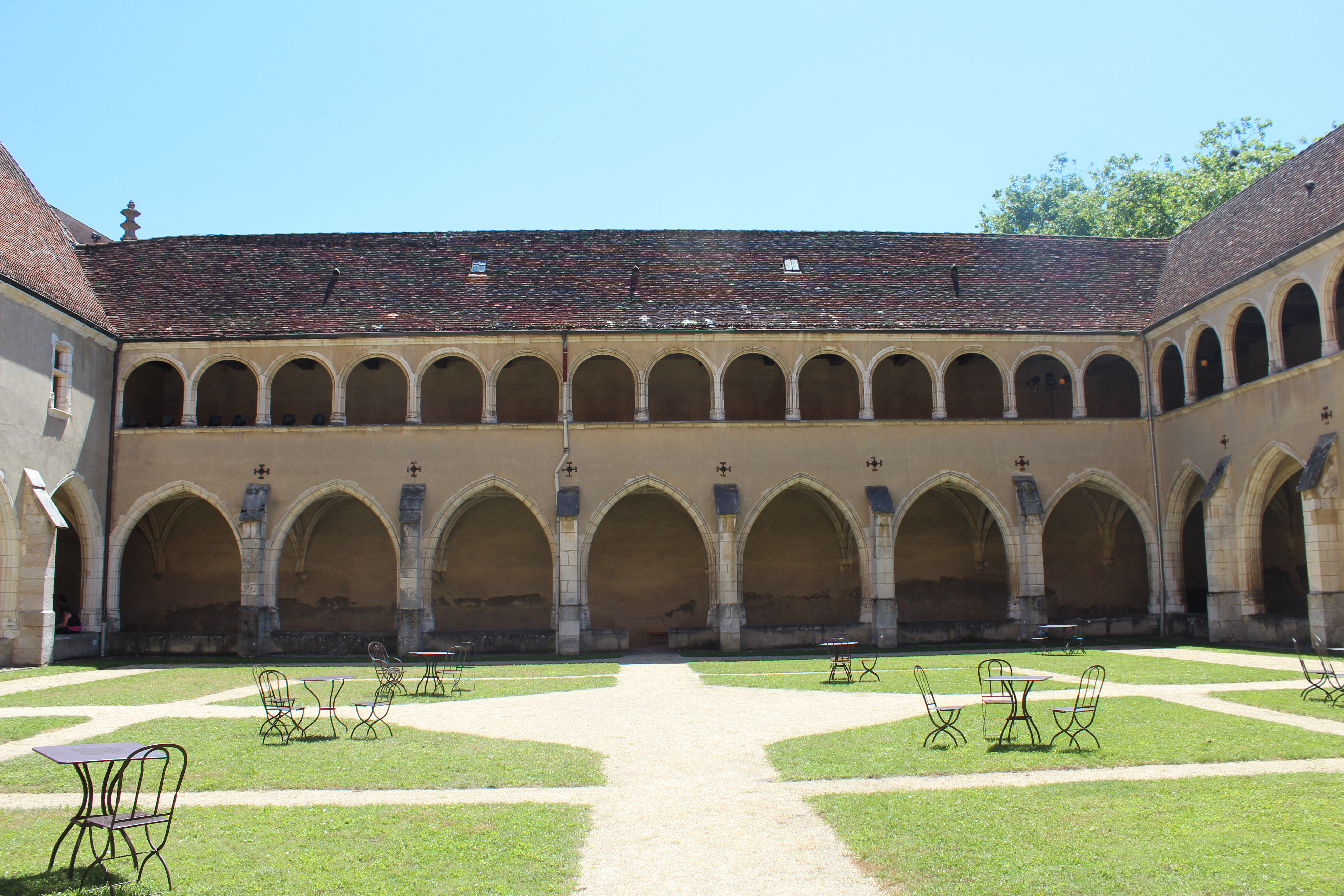 Deuxième croître, dit de la Ménagerie, du Monastère de Brou à Bourg-en-Bresse.